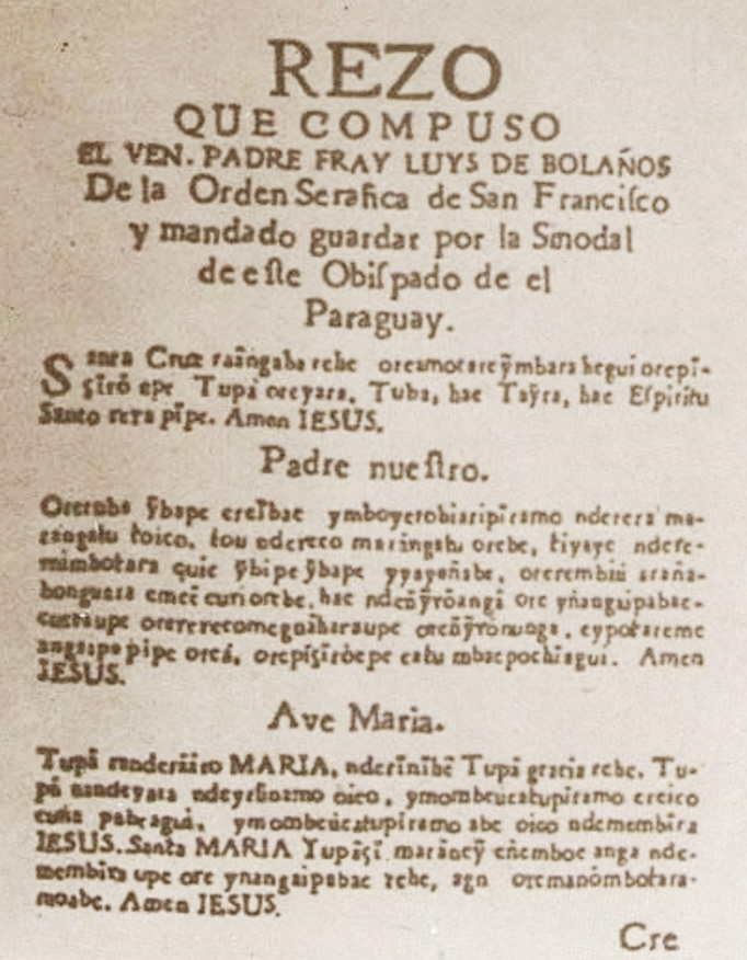 Pater noster & Ave Maria in Guaraní (Luis de Bolaños)